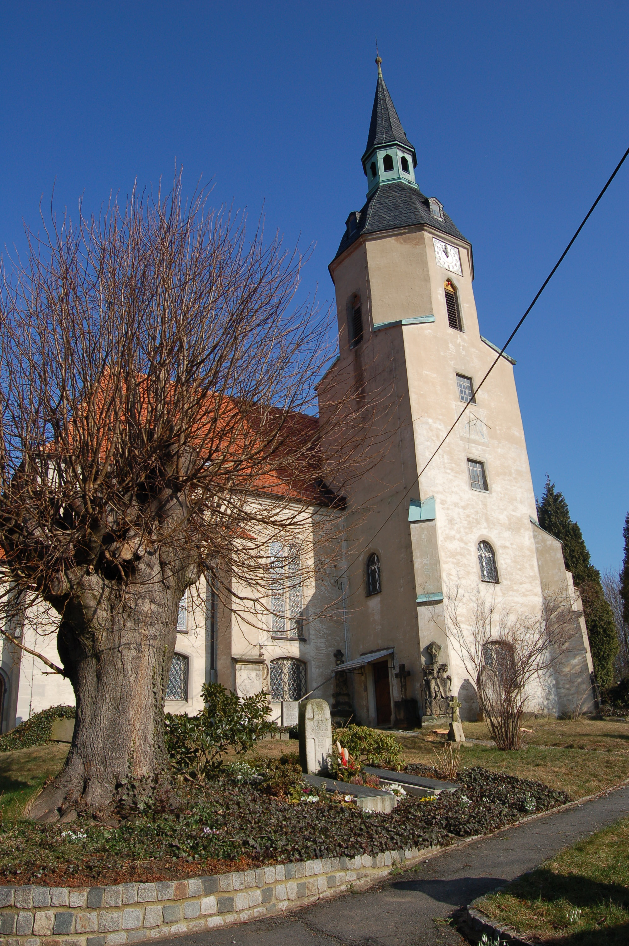 Church in Seifersdorf (Wachau)